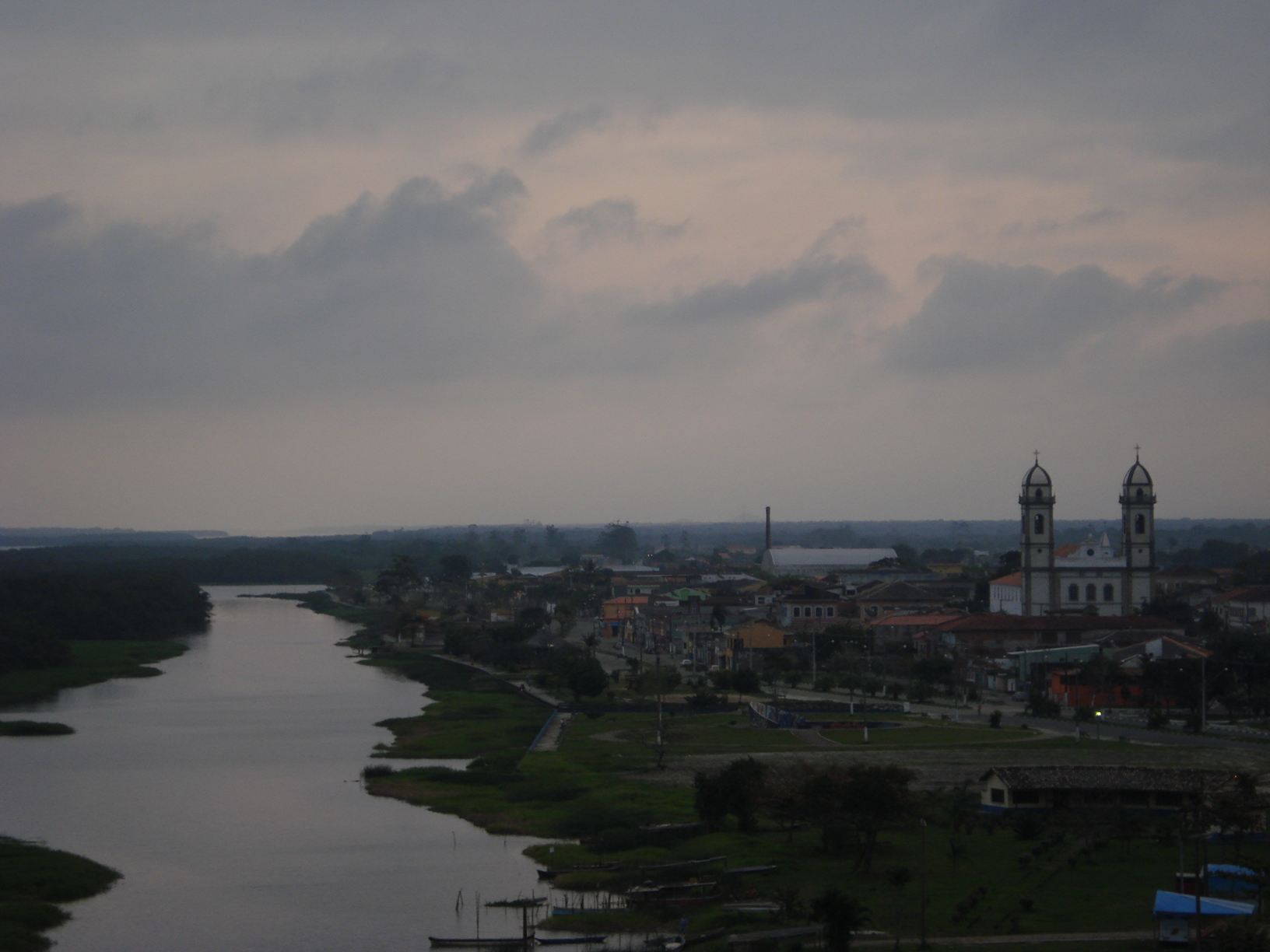 Vista da cidade de Iguape